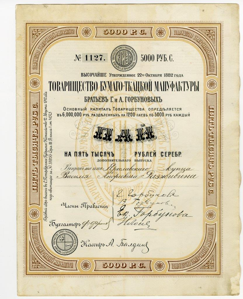 Пай на 5 тыс. руб. серебром Товарищества бумаго-ткацкой мануфактуры братьев Г. и А. Горбуновых. 1912 г.